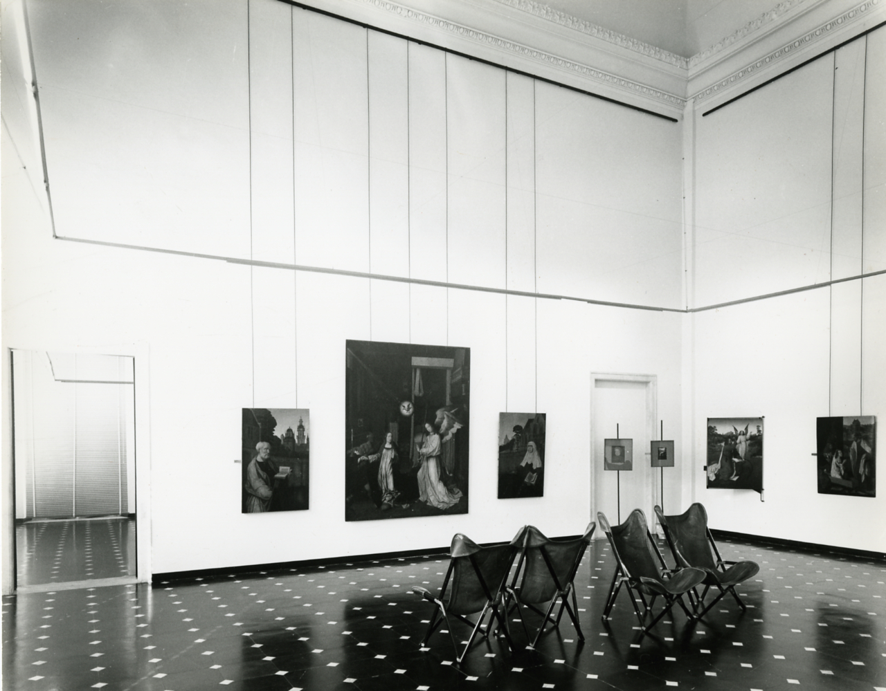 Servizio fotografico : Genova, 1970 / Paolo Monti. - Stampe: 9 : Positivo b/n, gelatina bromuro d'argento/ carta, 24x30. - ((Al verso delle stampe manoscritti i numeri dei negativi corrispondenti: 16219, 16295. - Sul coperchio della scatola iscrizione didascalica manoscritta a pennarello nero: "Genova e Liguria/ Città storiche". - Negli anni Settanta, le sculture e gli affreschi inseriti nel percorso museale, vennero trasferiti nel costituendo Museo di Sant'Agostino e Palazzo Bianco assunse l'attuale aspetto di pinacoteca. - Occasione: Documentazione del nuovo allestimento della Galleria di Palazzo Bianco. - Fonte: Agenda di Paolo Monti: Monti/ 3 aprile 1966 - 9 marzo 1971/ 12421-16823 (1966-1970), presso Archivio Paolo Monti. - Fonte: Fattura di Paolo Monti: IV. Commesse/ Fattura/ Fotografie Palazzo Bianco - sale nuovo allestimento (1970/12/01), presso Archivio Paolo Monti